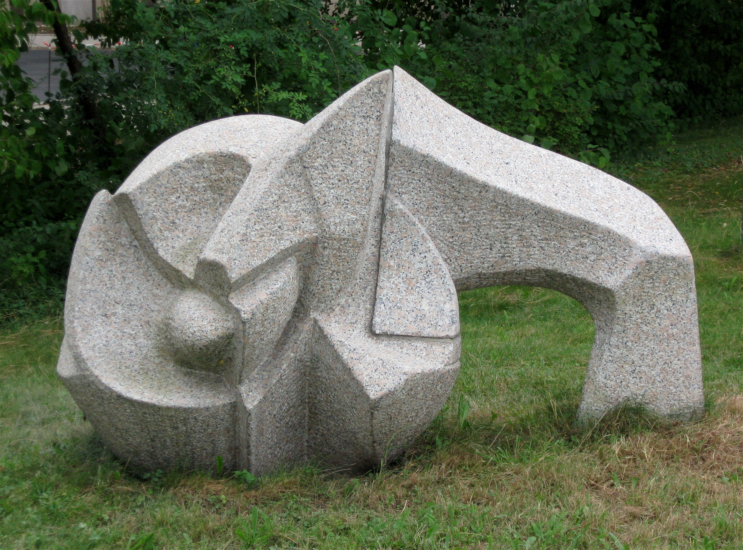 Michael Friederichsen: Fructus, 1989, München-Neuperlach